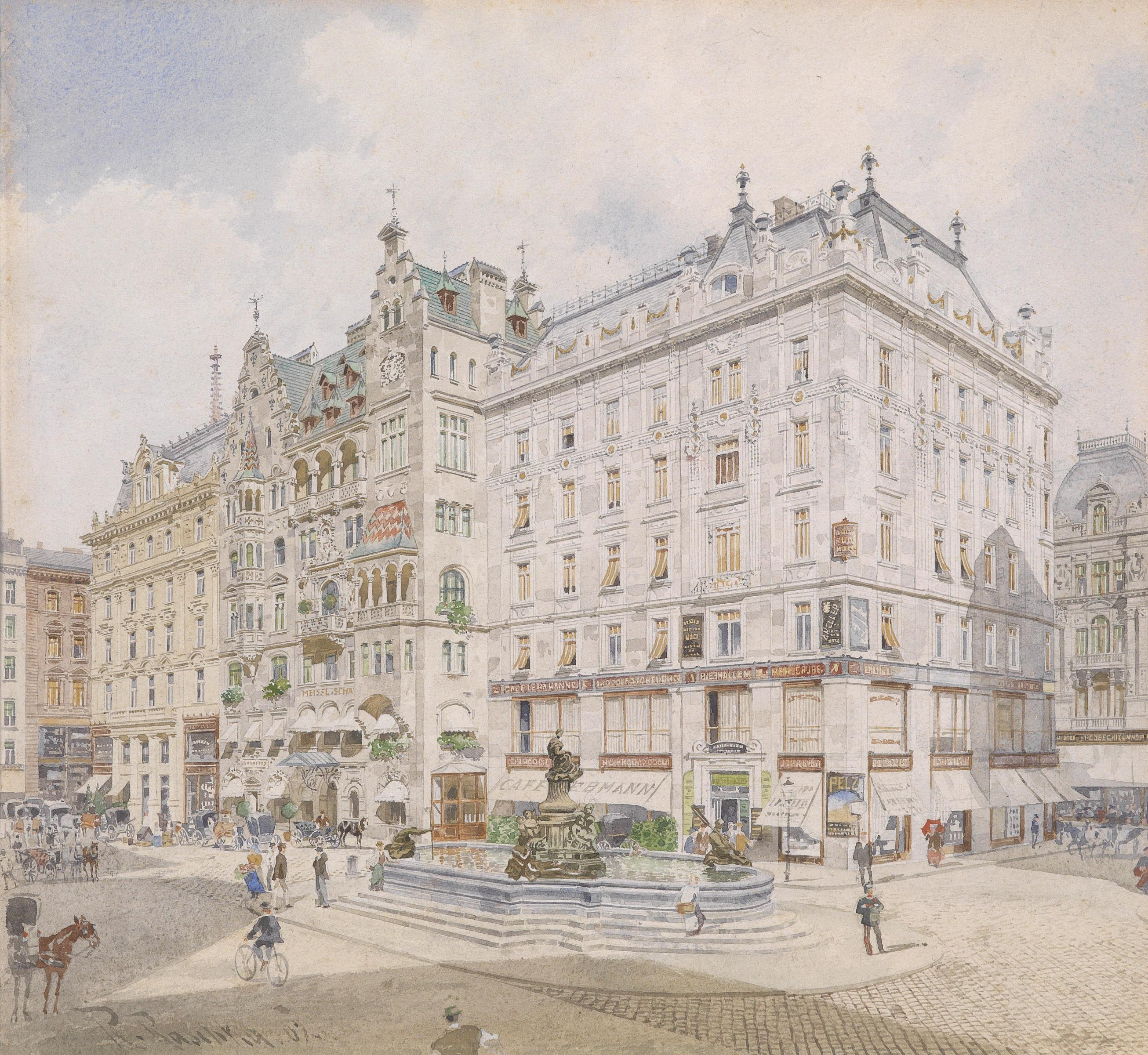 Der Donnerbrunnen am Neuen Markt, signiert und datiert R. Raschka (19)07, Aquarell auf Papier, 29 x 31 cm